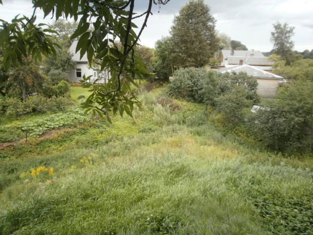 Idabastionilt üle vallikraavi paistvad Salacgrīva elamud